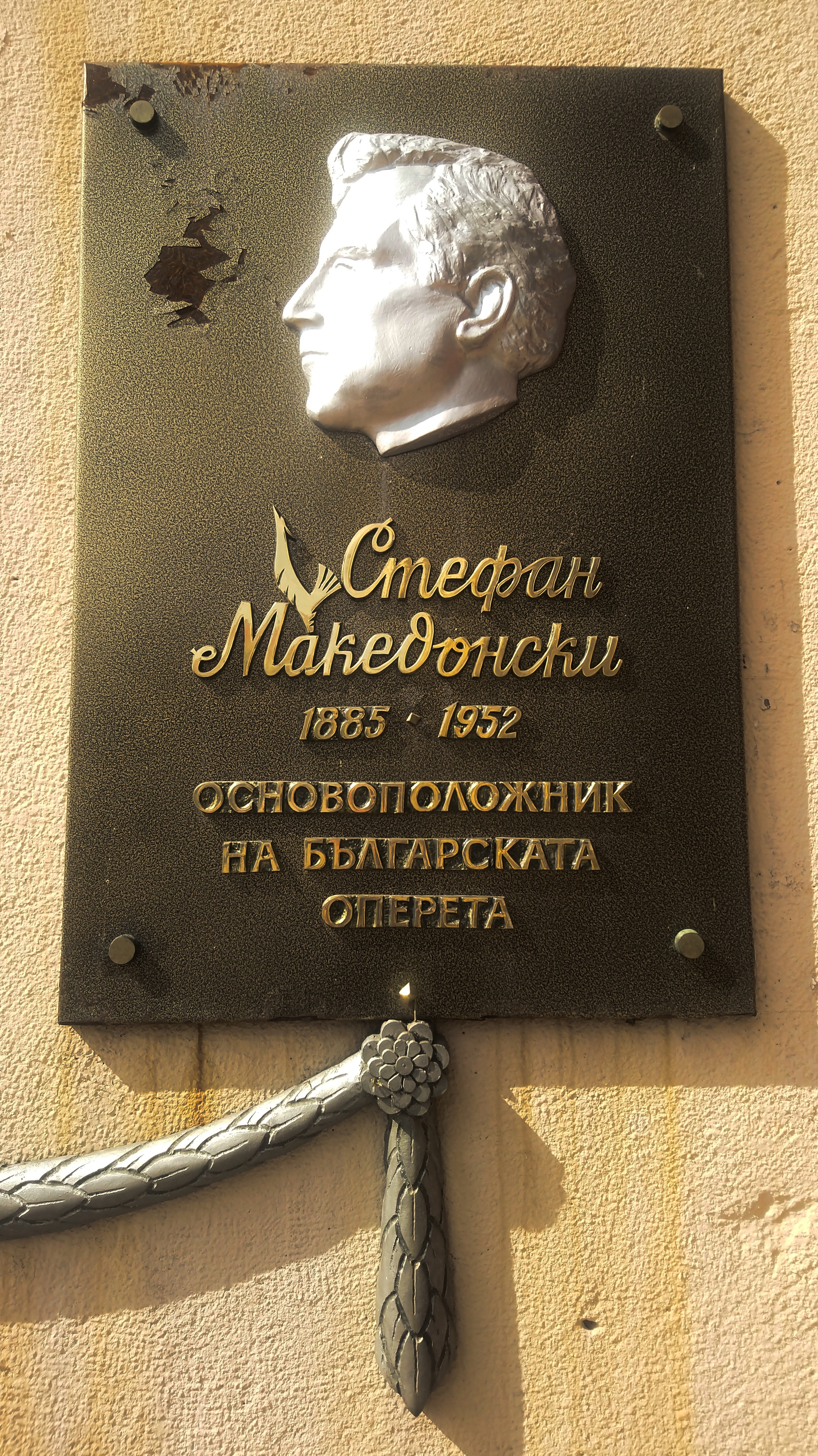 Паметна плоча на основоположника на българската оперета Стефан Македонски в центъра на Сливен